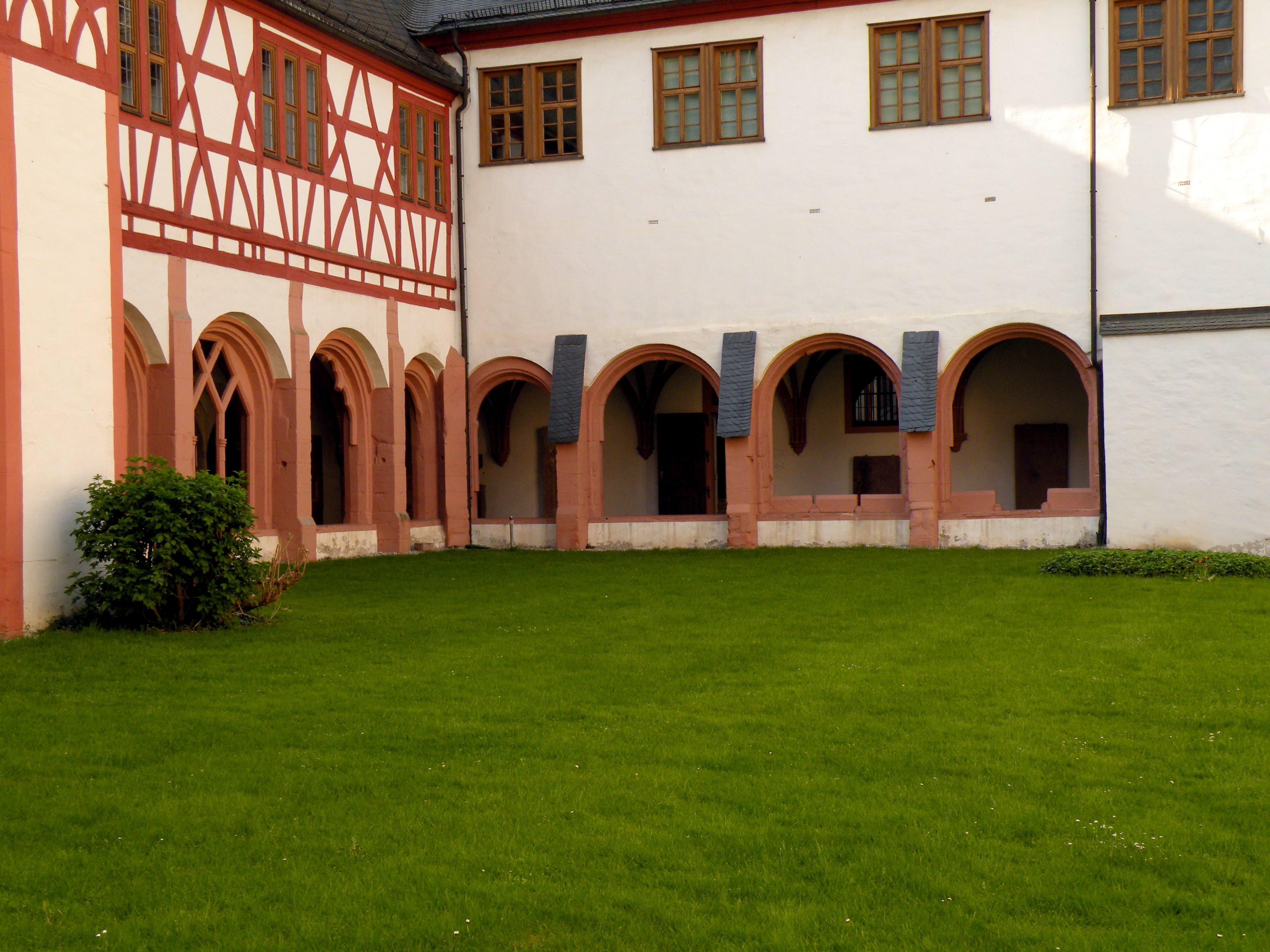 Kloster Eberbach, Innenhof